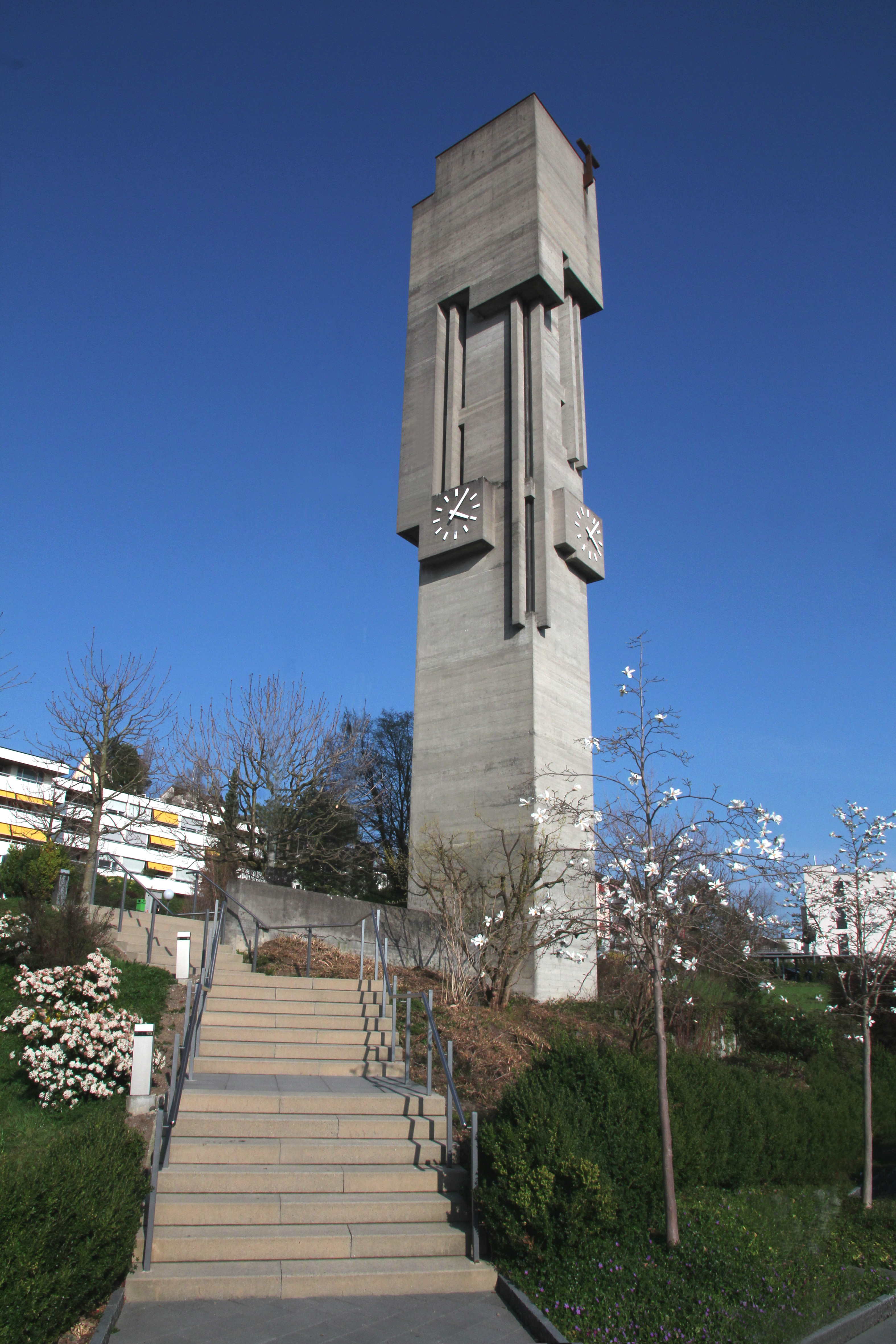 Römisch-katholische Pfarrkirche St. Martin Meilen